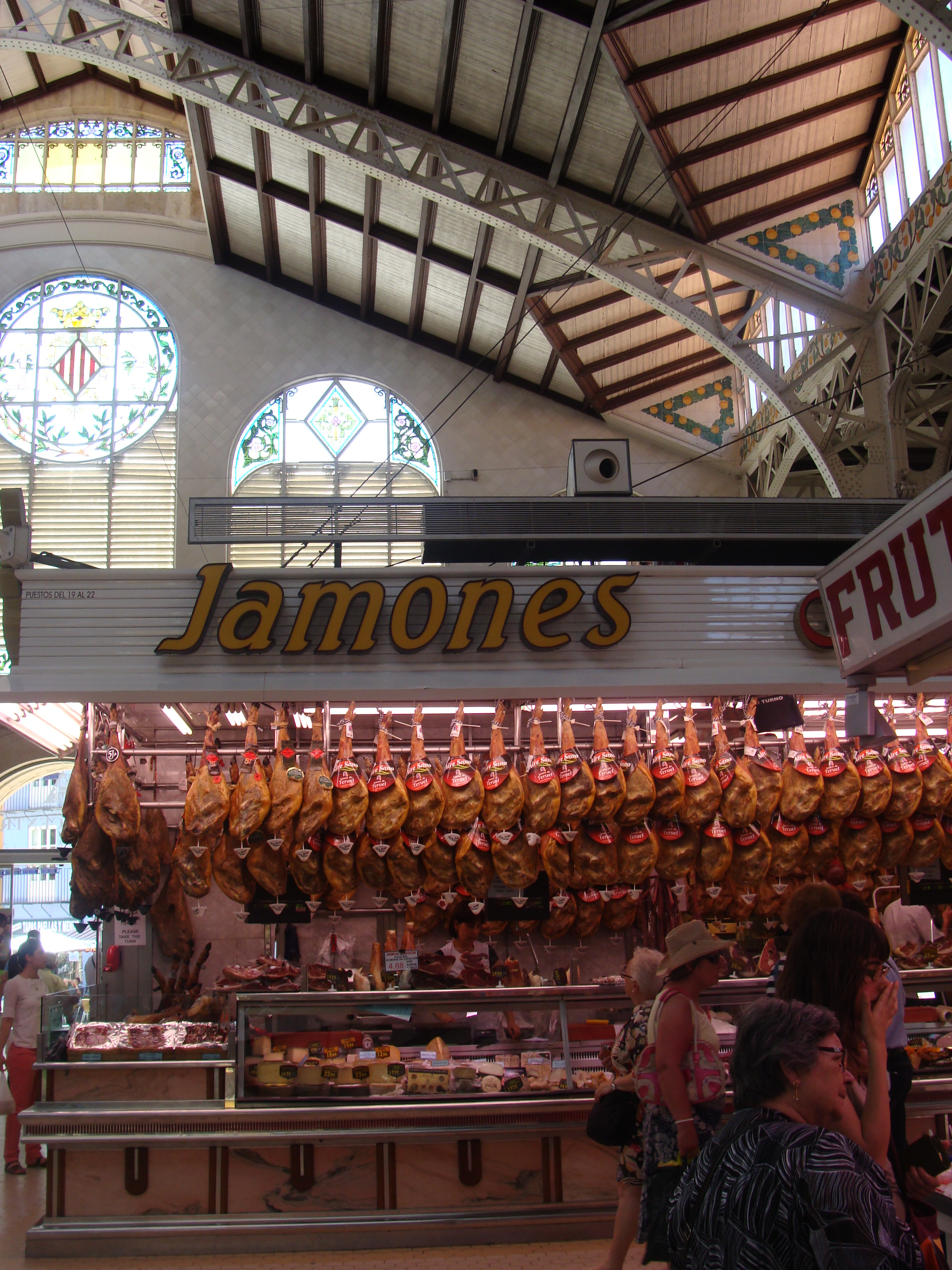 Vista parcial del Mercado Central de Valencia. Jamones y embutidos